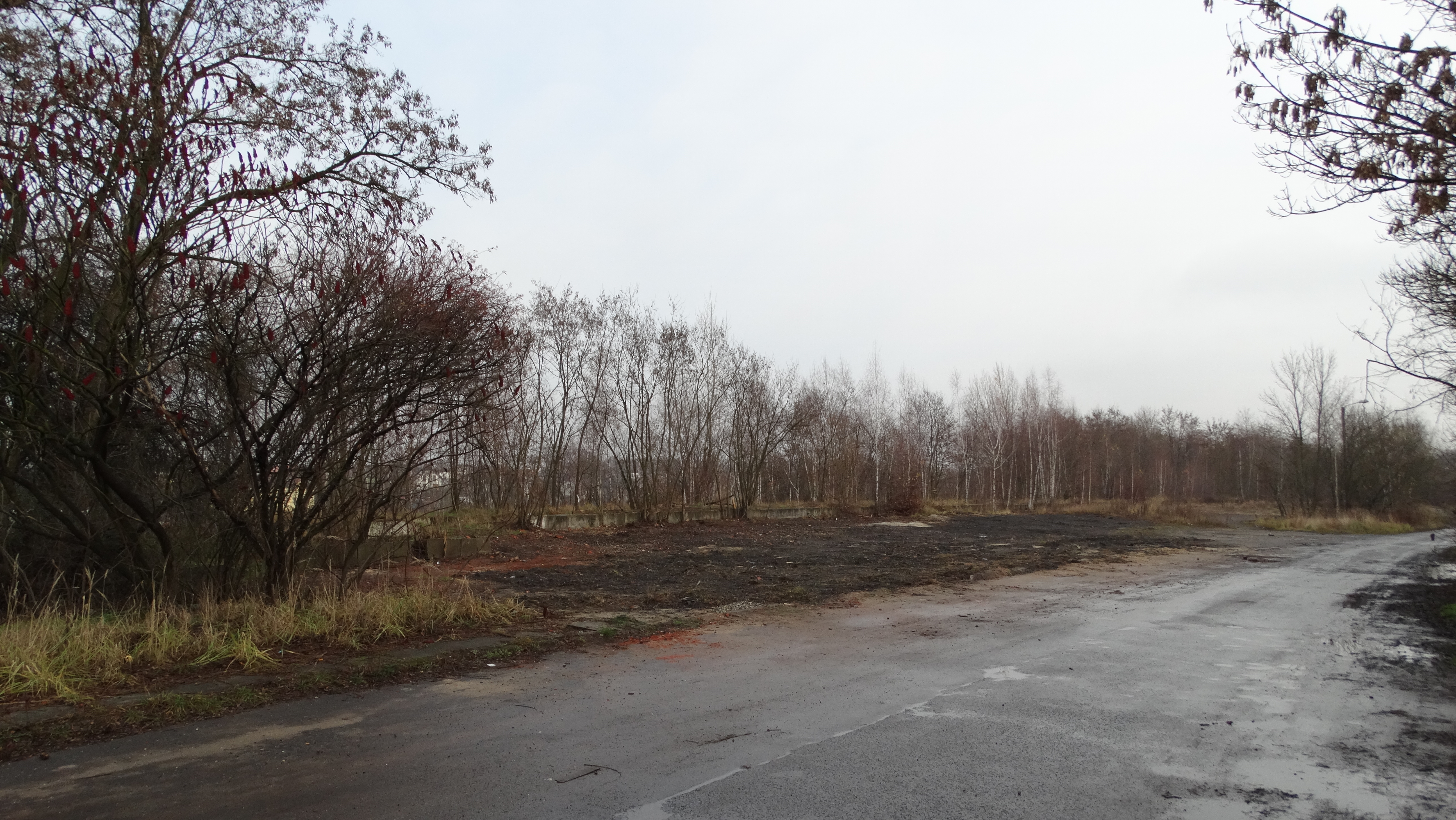 Teren po budynku stacji kolejowej Jastrzębie Zdrój. Wyburzony w październiku 2018 roku.